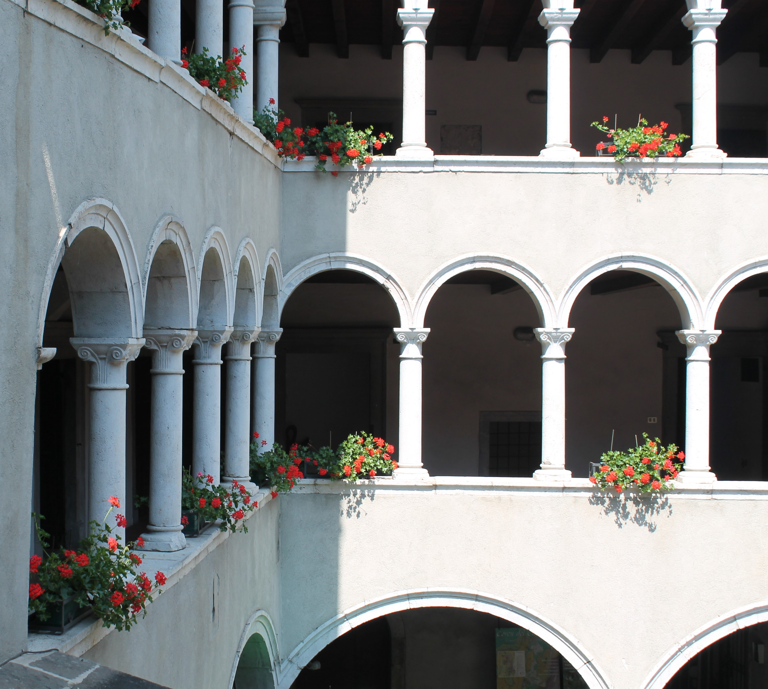 Colonnine del loggiato del Palazzo Milesi - Gromo